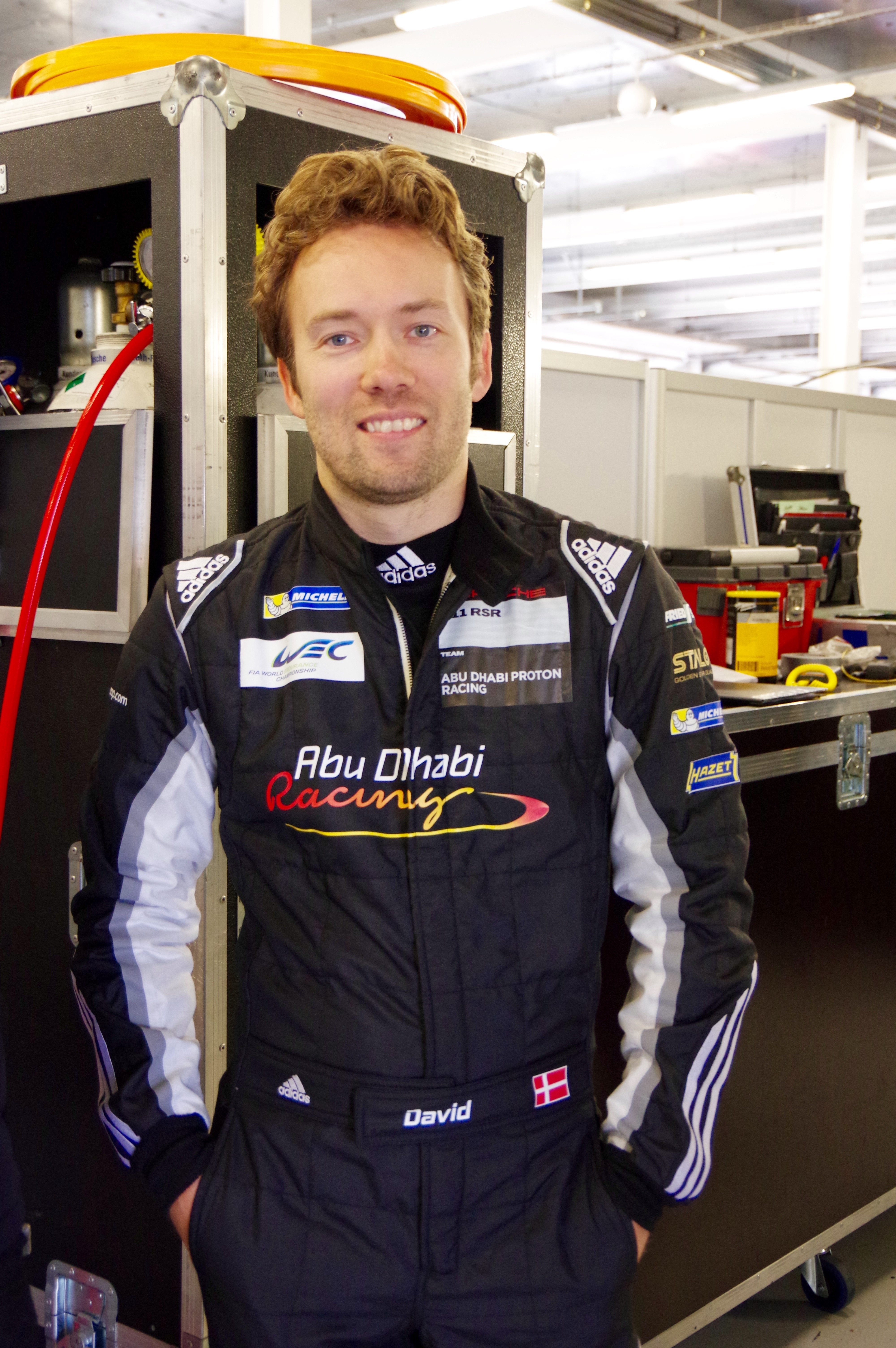 David Heinemeier Hansson, driver of Abu Dhabi Proton Racing's Porsche 911 RSR